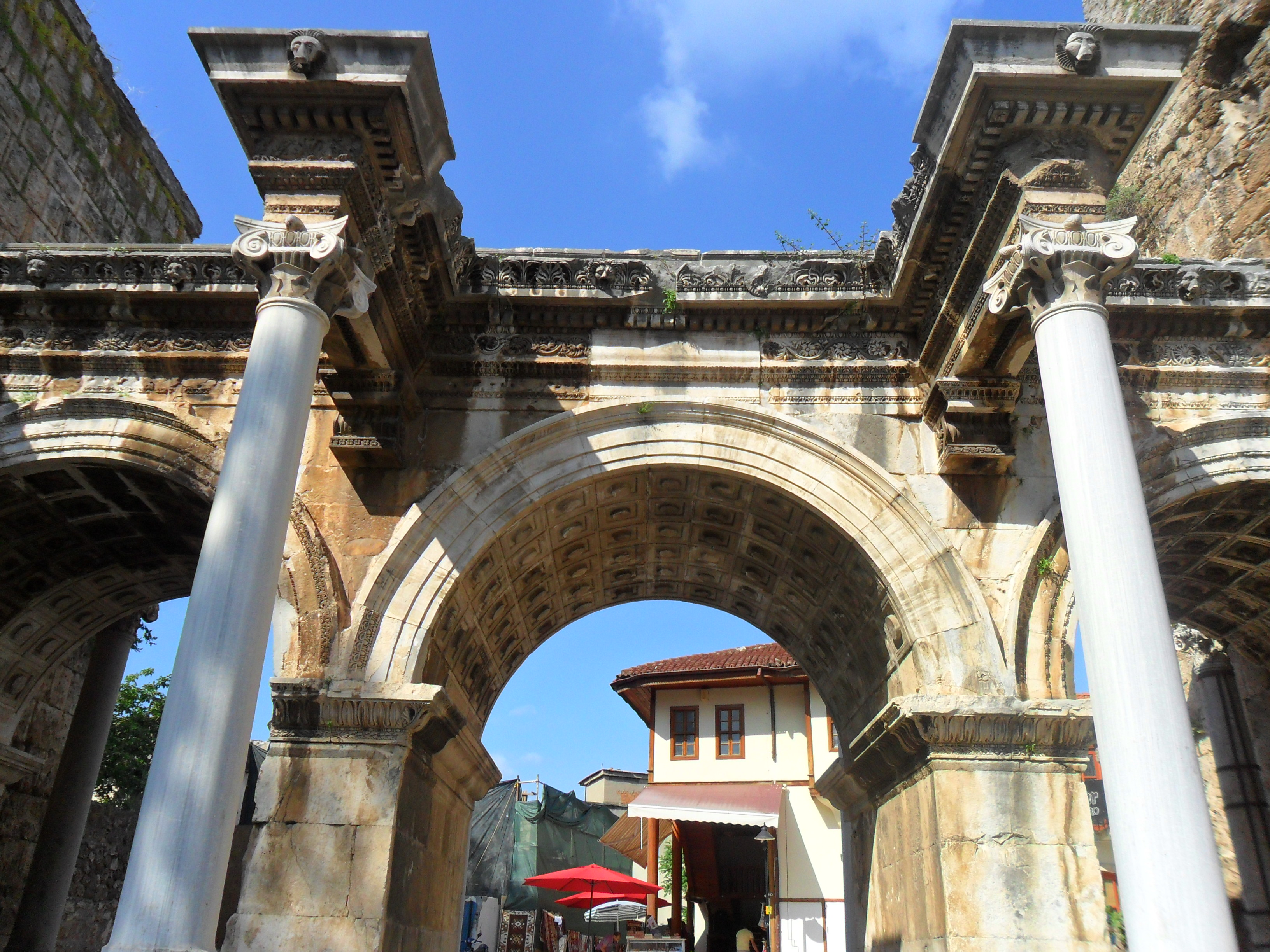 Antalya'daki Hadrian Kapısı'ndan bir görünüm.